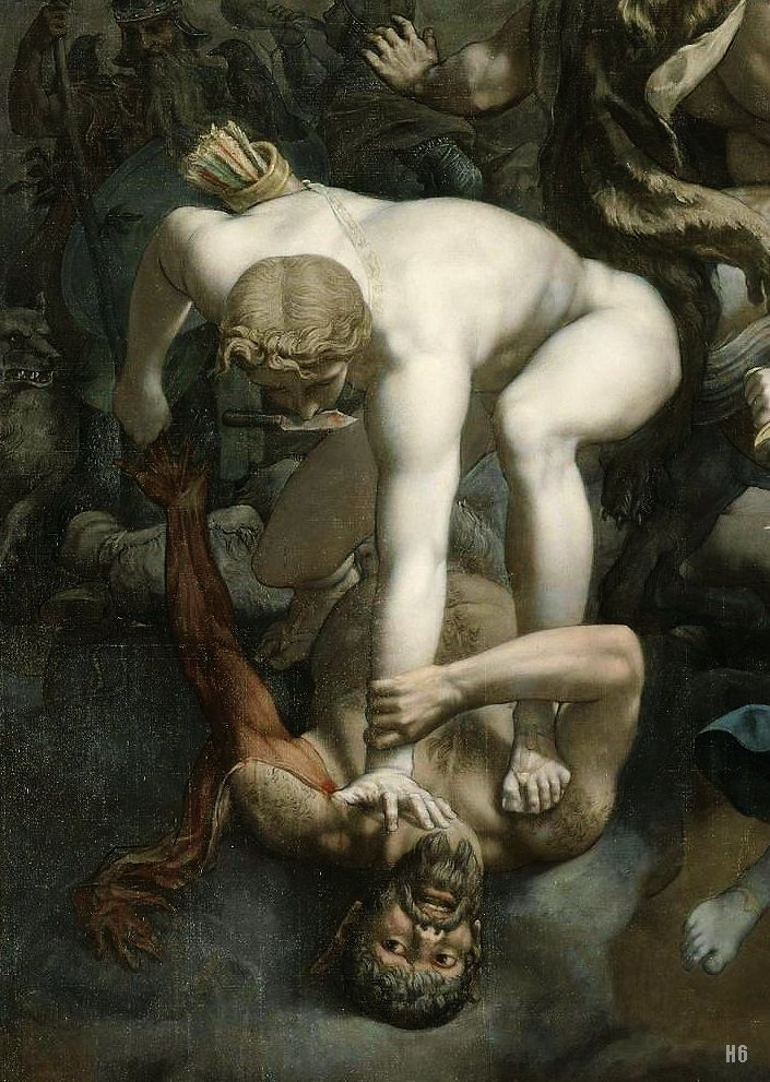 detail